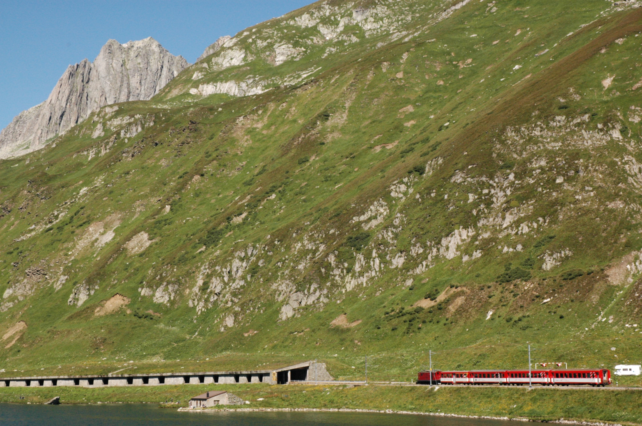 Zug der Matterhorn–Gotthard-Bahn mit HGe 4/4 I, einem AB Mitteleinstieg ex BVZ, einem BDR ex BVZ (Typ SIG1) und zwei B (Typ SIG2) am Oberalpsee am 20.7.2005